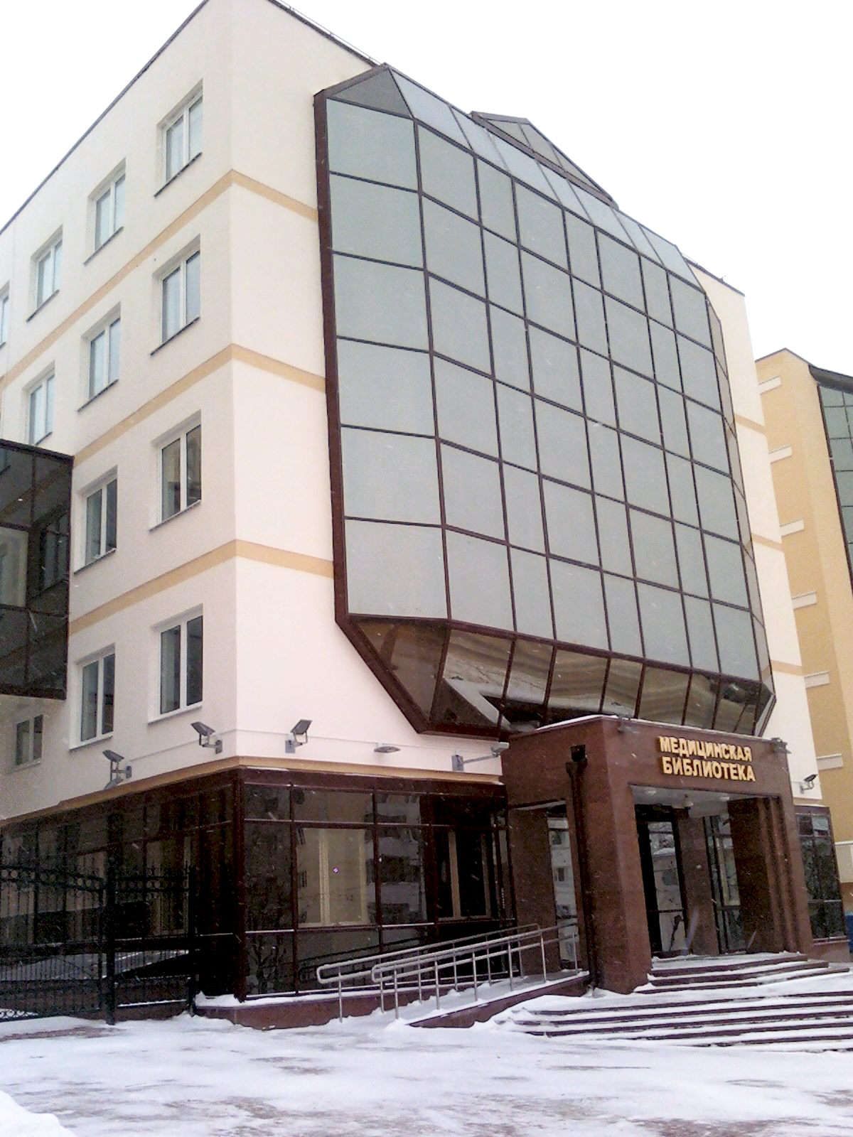 Медицинская библиотека ВГМУ